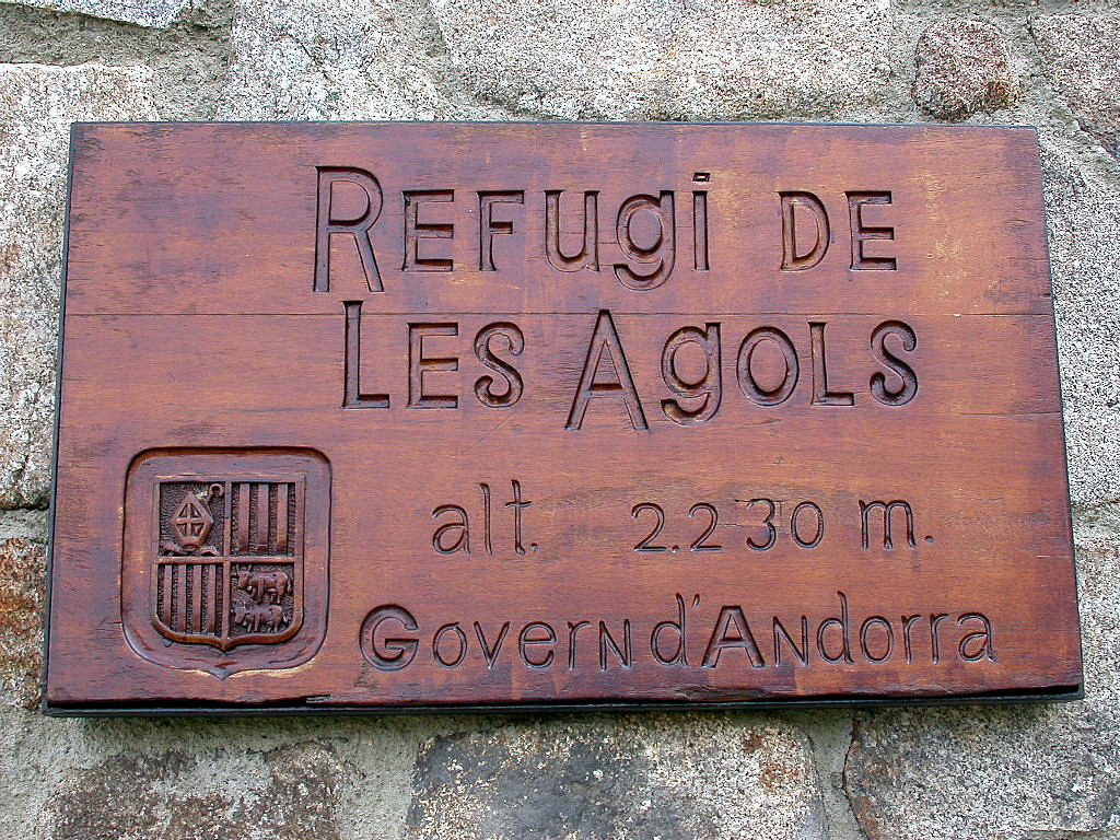 Refugi d'Agols Plaque refuge